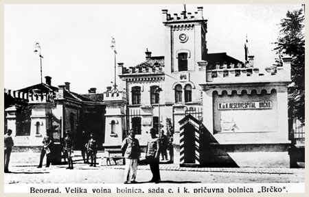 Srpski (latinica): Upravna zgrda Centralne vojne bolnice na Vračaru, koja je tokom Prvog svetskog rata u jesen 1915. godine bila preimenovana u pričuvnu bolnicu »Brčko« u Beogradu